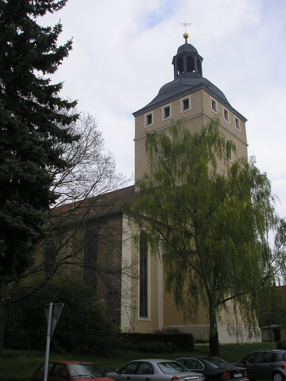 Die Stadtkirche von Greußen (Thüringen).